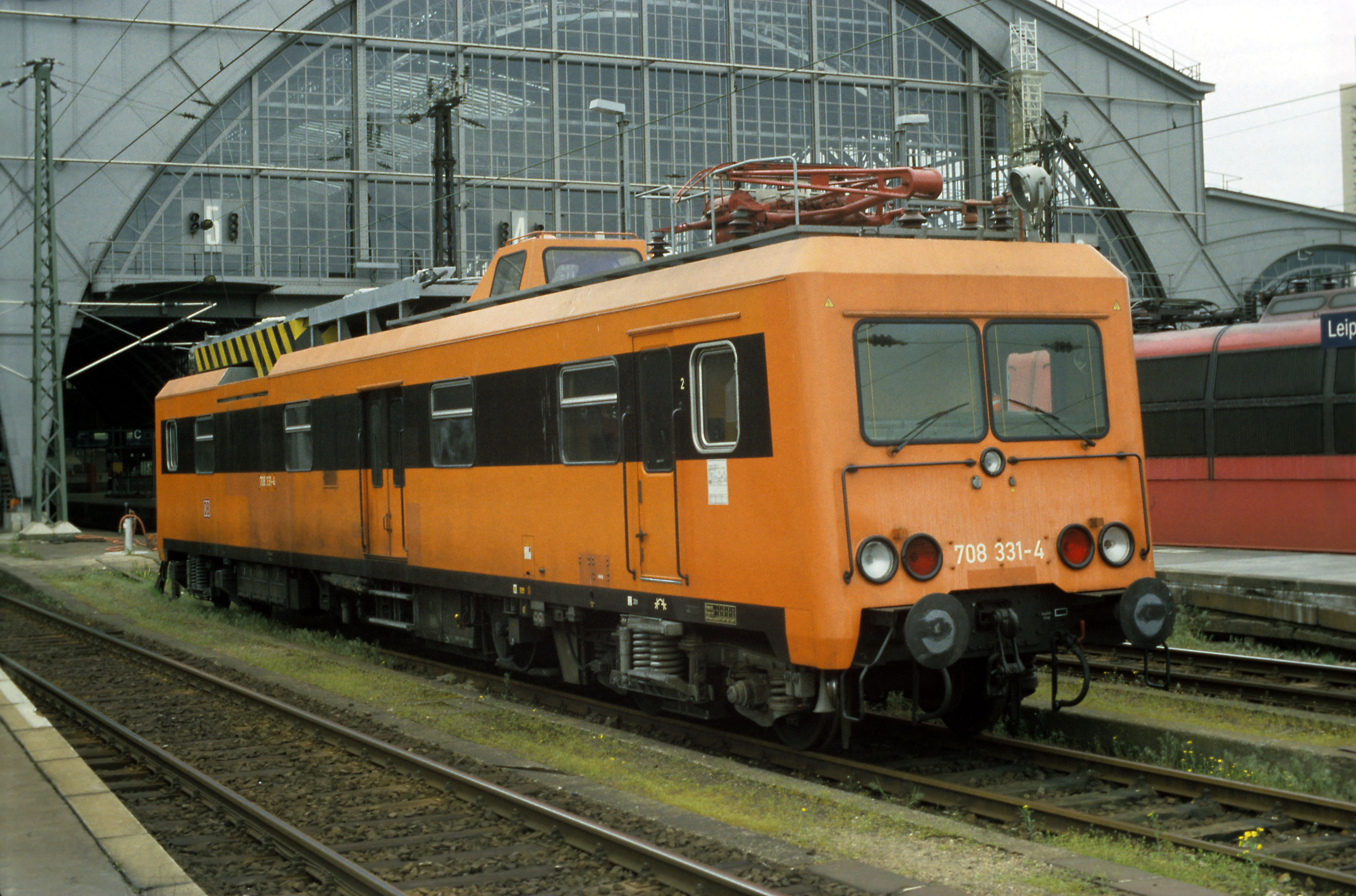 ORT der BR 708.3 (DR 188.3) vor der Bahnsteighalle